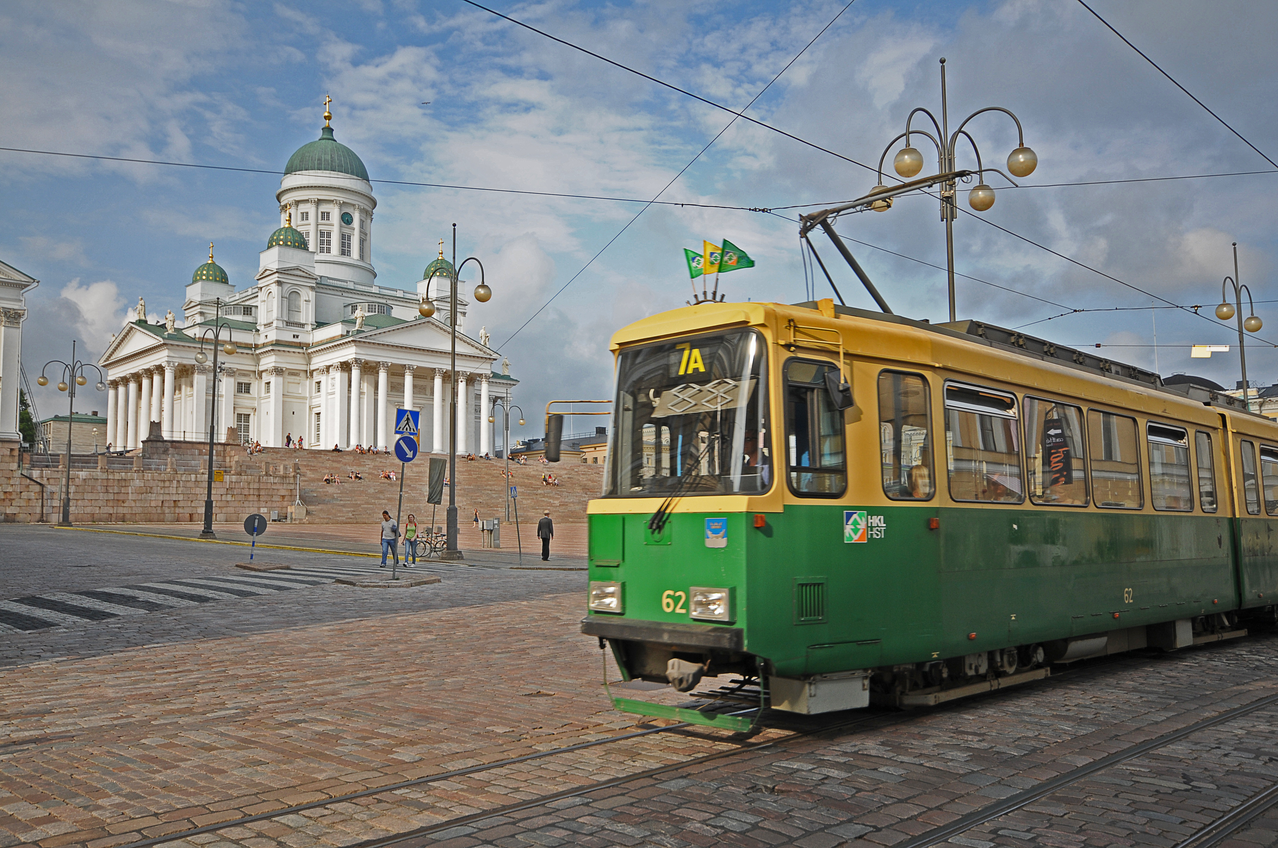 Helsinki